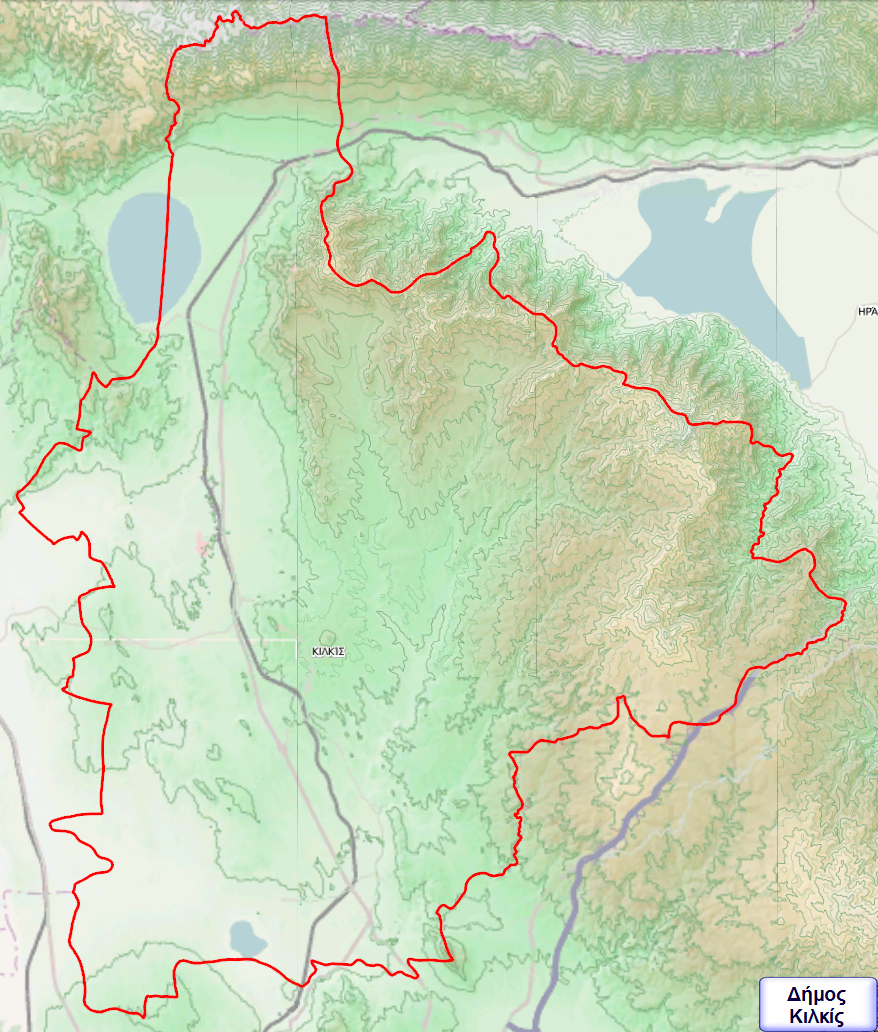 Τοπογραφικός χάρτης του Δήμου Κιλκίς